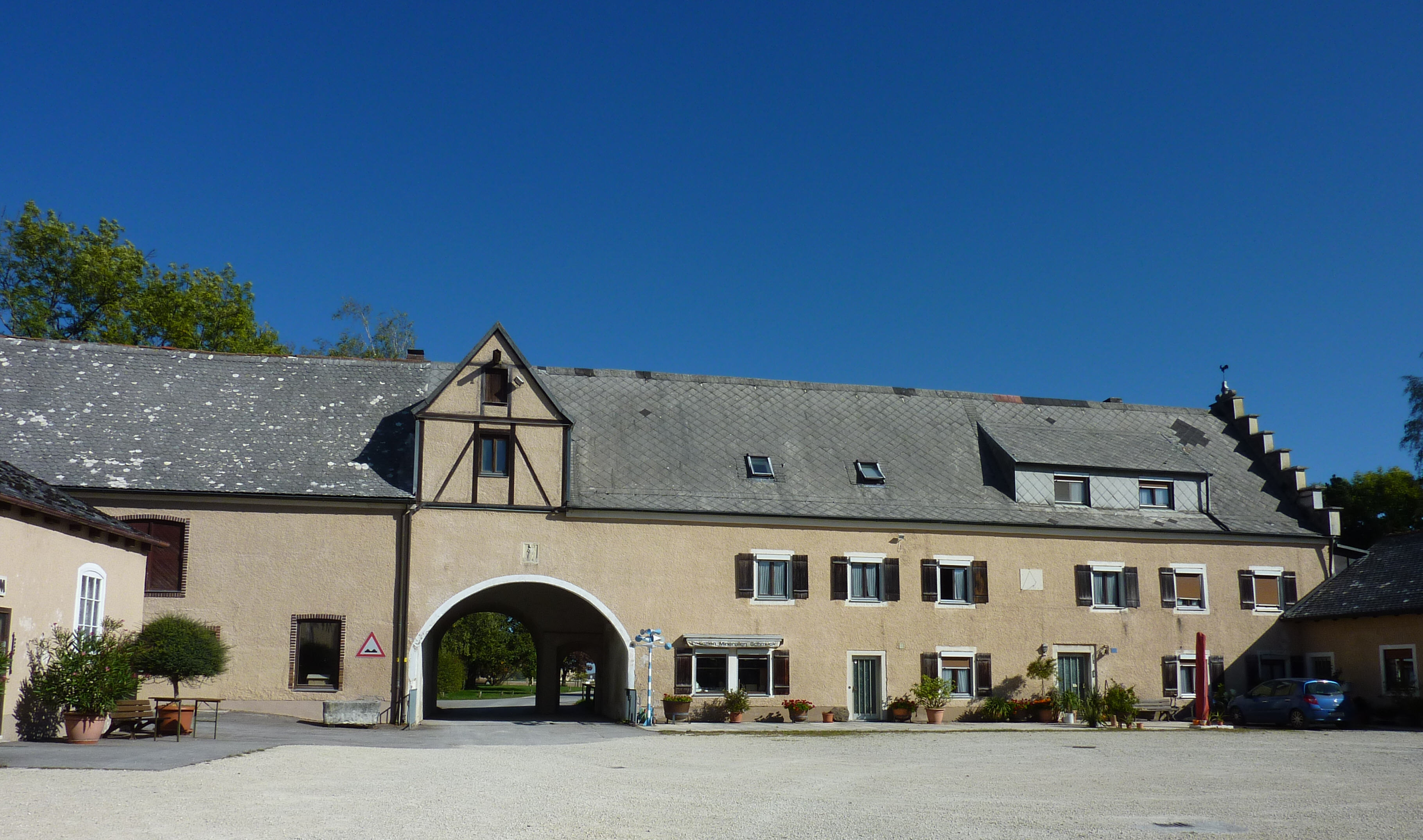 der Harthof, Sitz des Museums Bergér